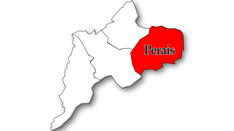 População